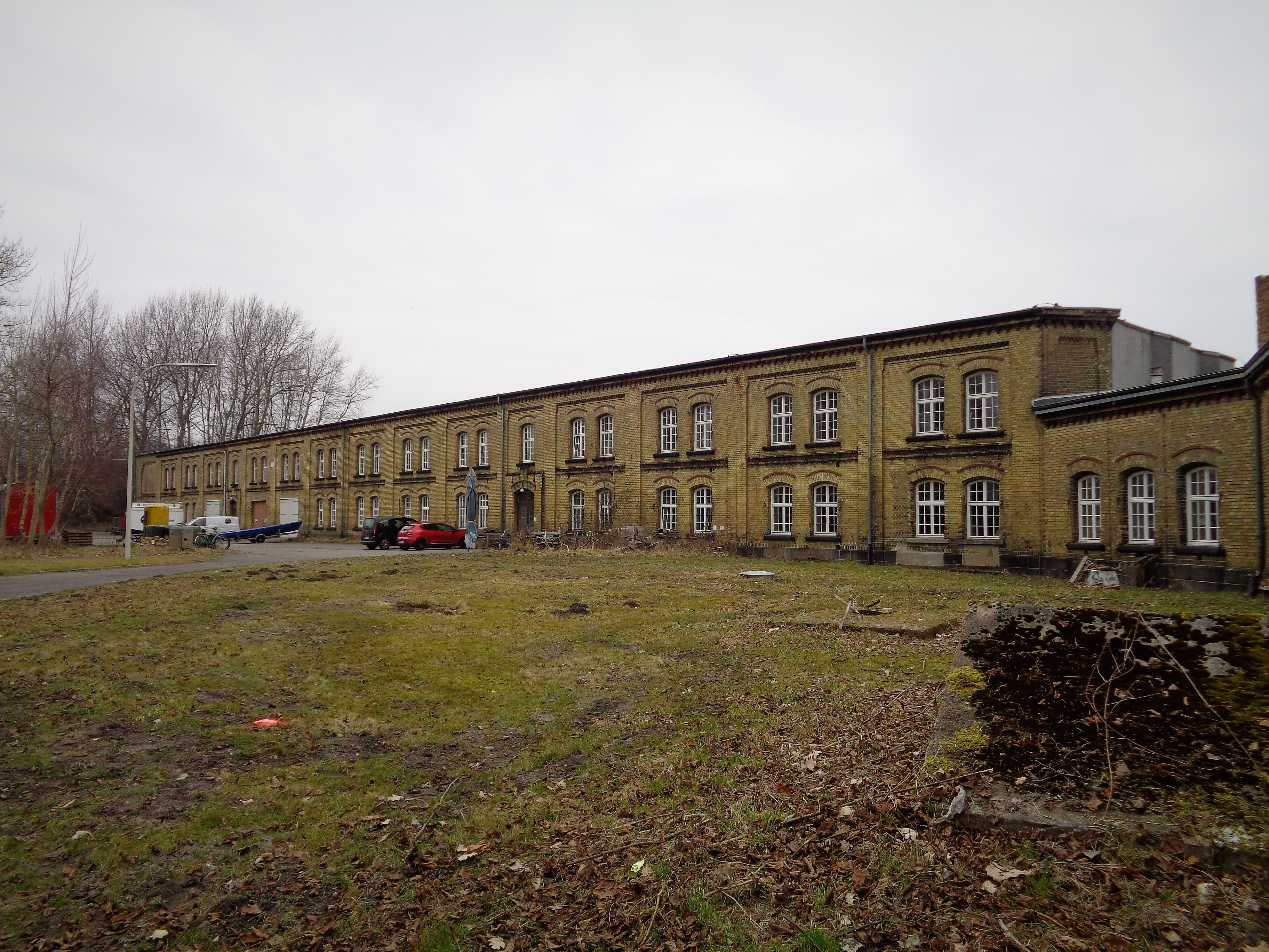 Die Südansicht der der südlichen Kasematte der Festung Kiel-Friedrichsort.